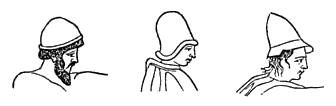 Pileus.